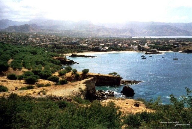 Blick auf die Bucht und die Stadt Tarrafal auf Santiago (Kap Verde) vom Monte Graciosa aus.